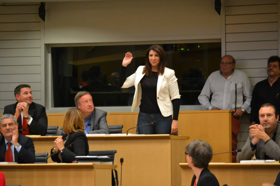 prestation de serment